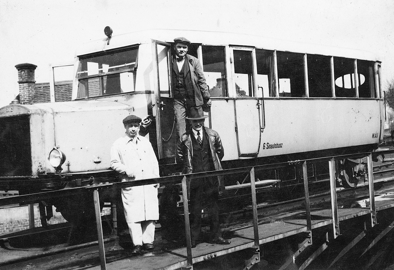 MÁV DSA könnyű motorkocsi (sinautóbusz). Tags: railway, Hungarian Railways, railway turntable Title: MÁV DSA könnyű motorkocsi (sinautóbusz).